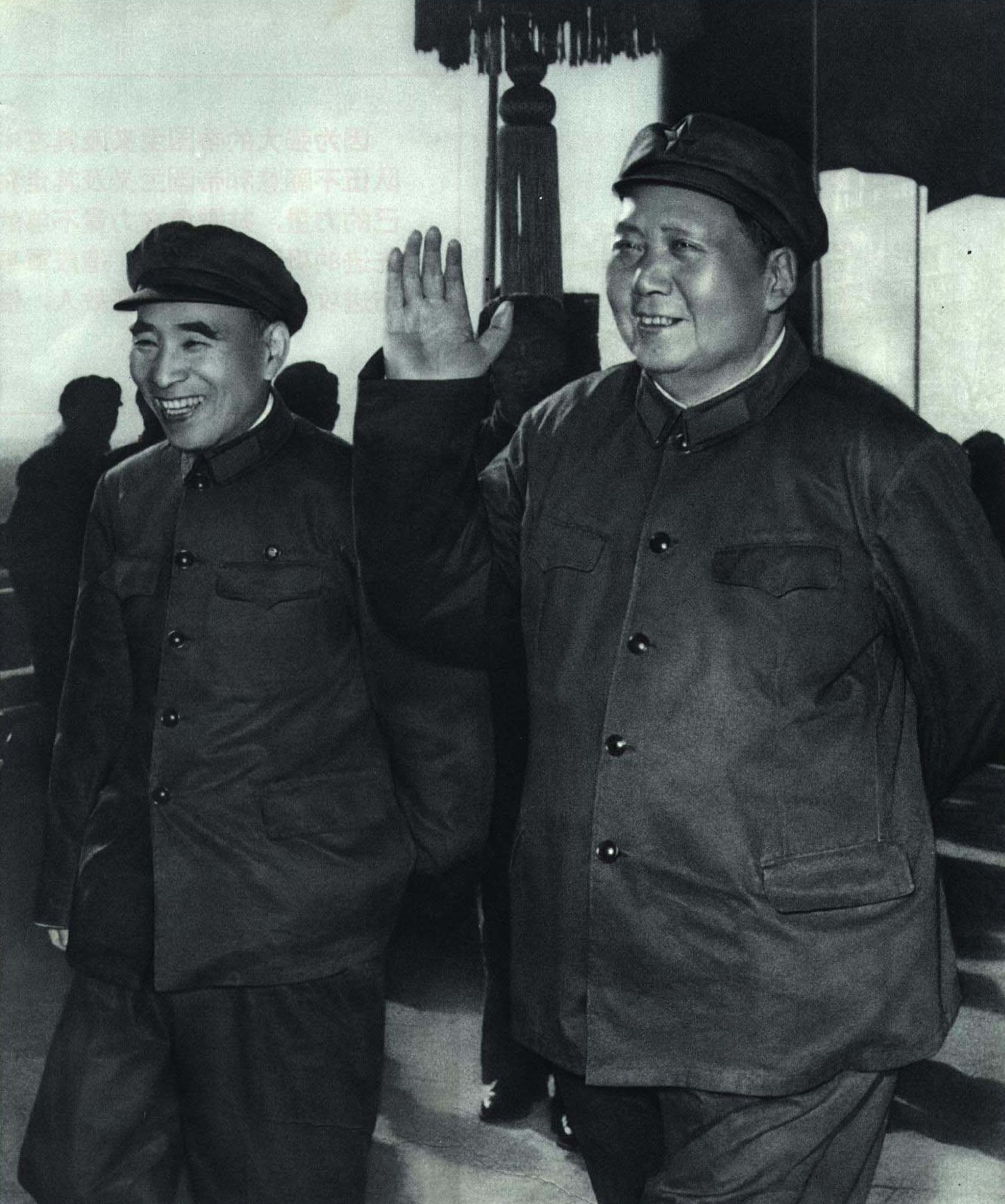 1967-10 1967年毛泽东与林彪